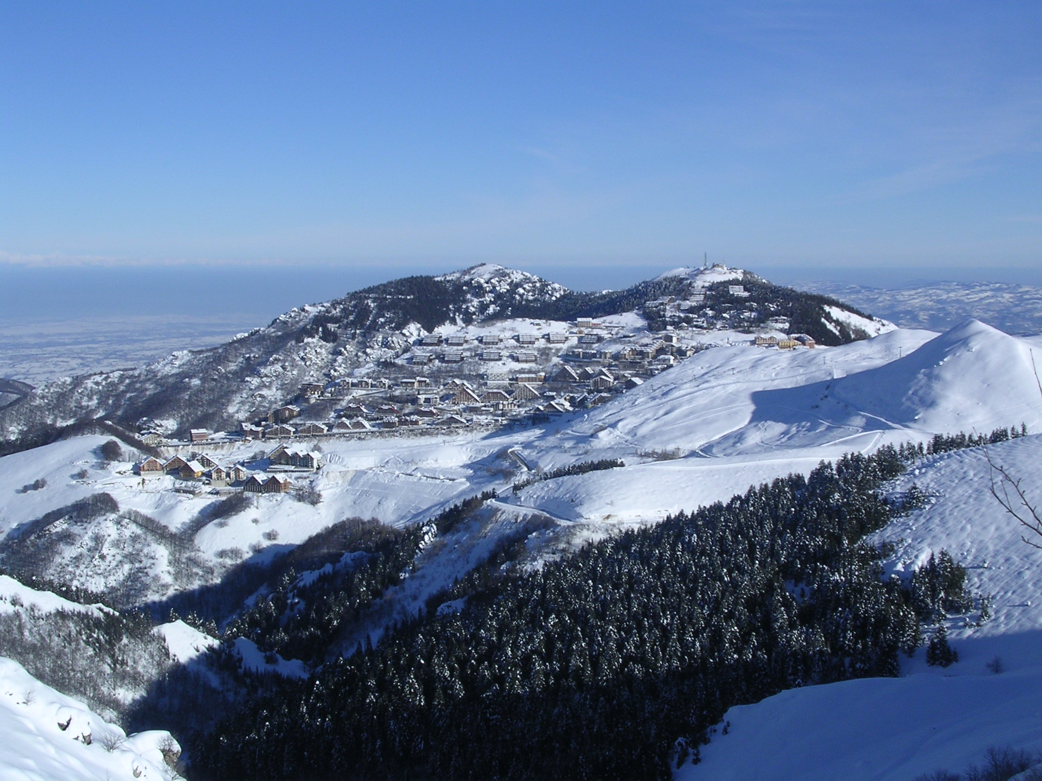 Panorama invernale di prato Nevoso